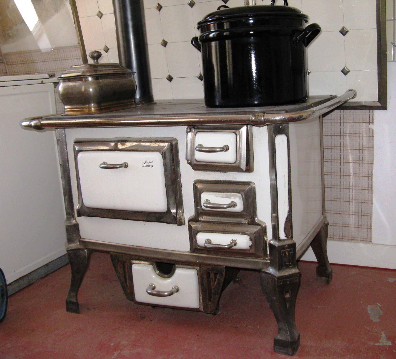 Alter Herd